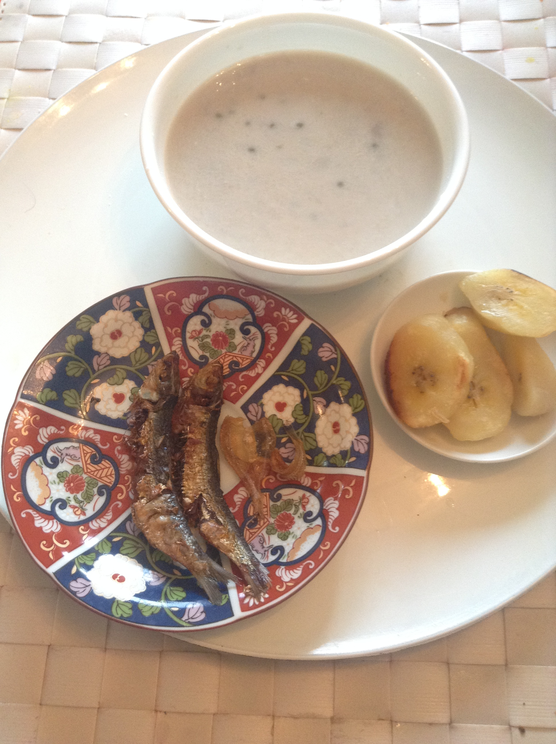 Tagalog: Ginataang monggo, hawot, at saging